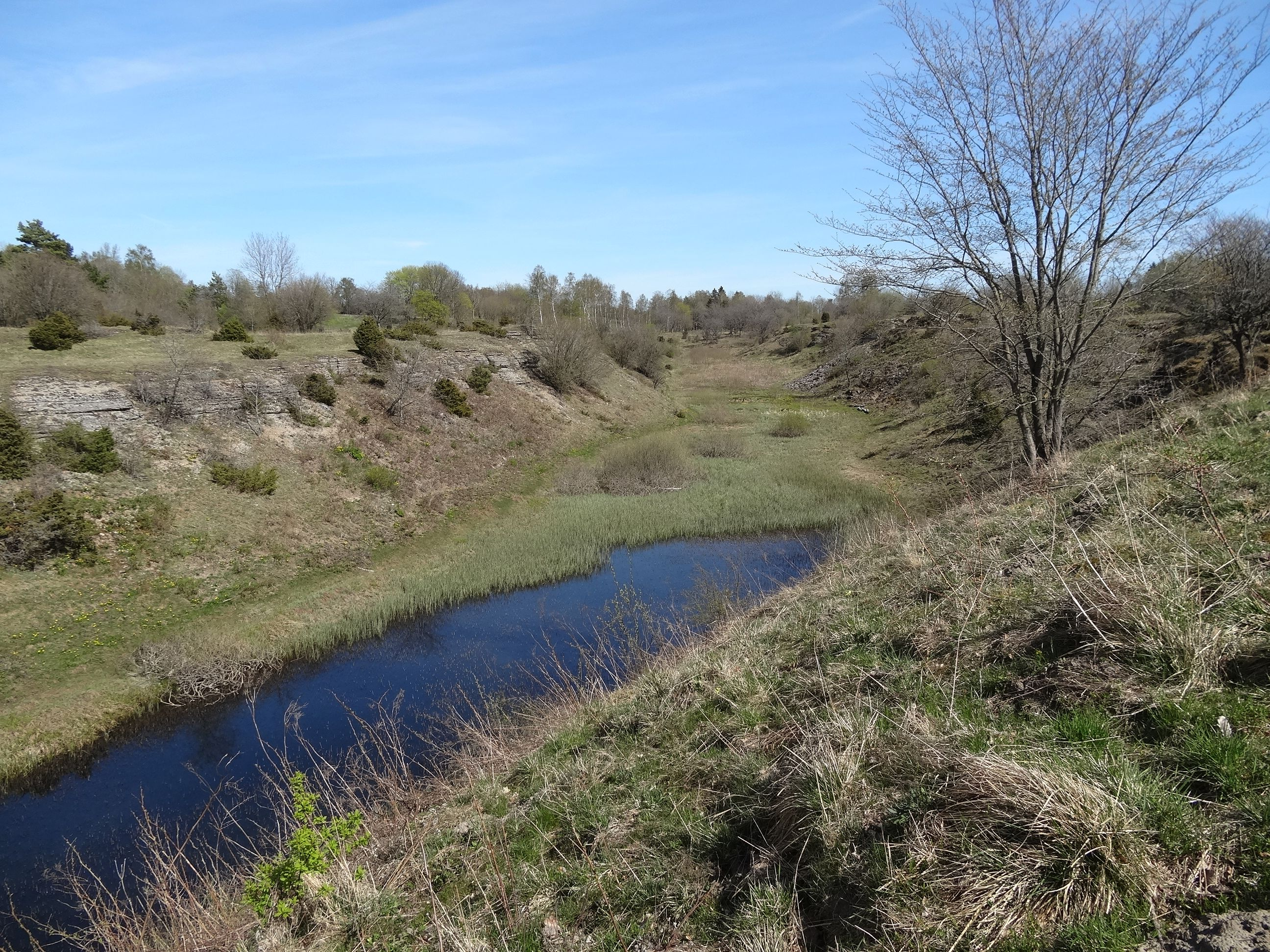 Stora vattenmassor har skurit ut en 14 meter djup canyon i kalkstenen vid naturreservatet Djupadalen i Dala nordost om Falköping.